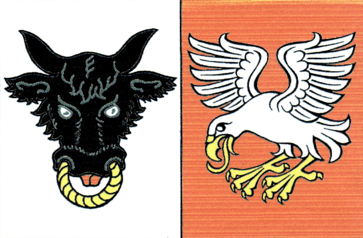 Vlajka obce Pernštejnské Jestřabí